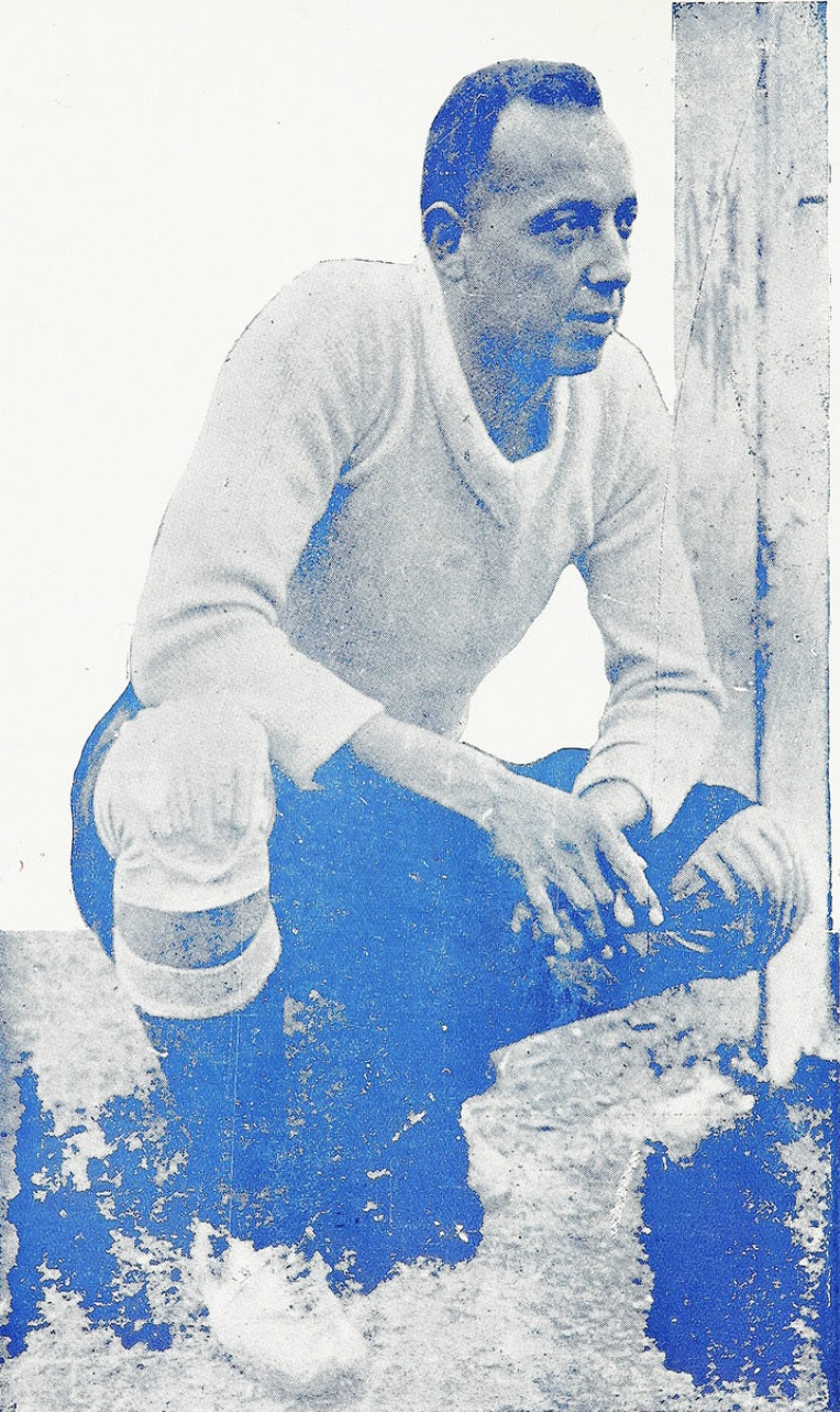 Roberto Cortés González (Iquique, 2 de febrero de 1905 — 30 de agosto de 1975) Fue un futbolista chileno. Jugaba de portero y militó en Colo-Colo.